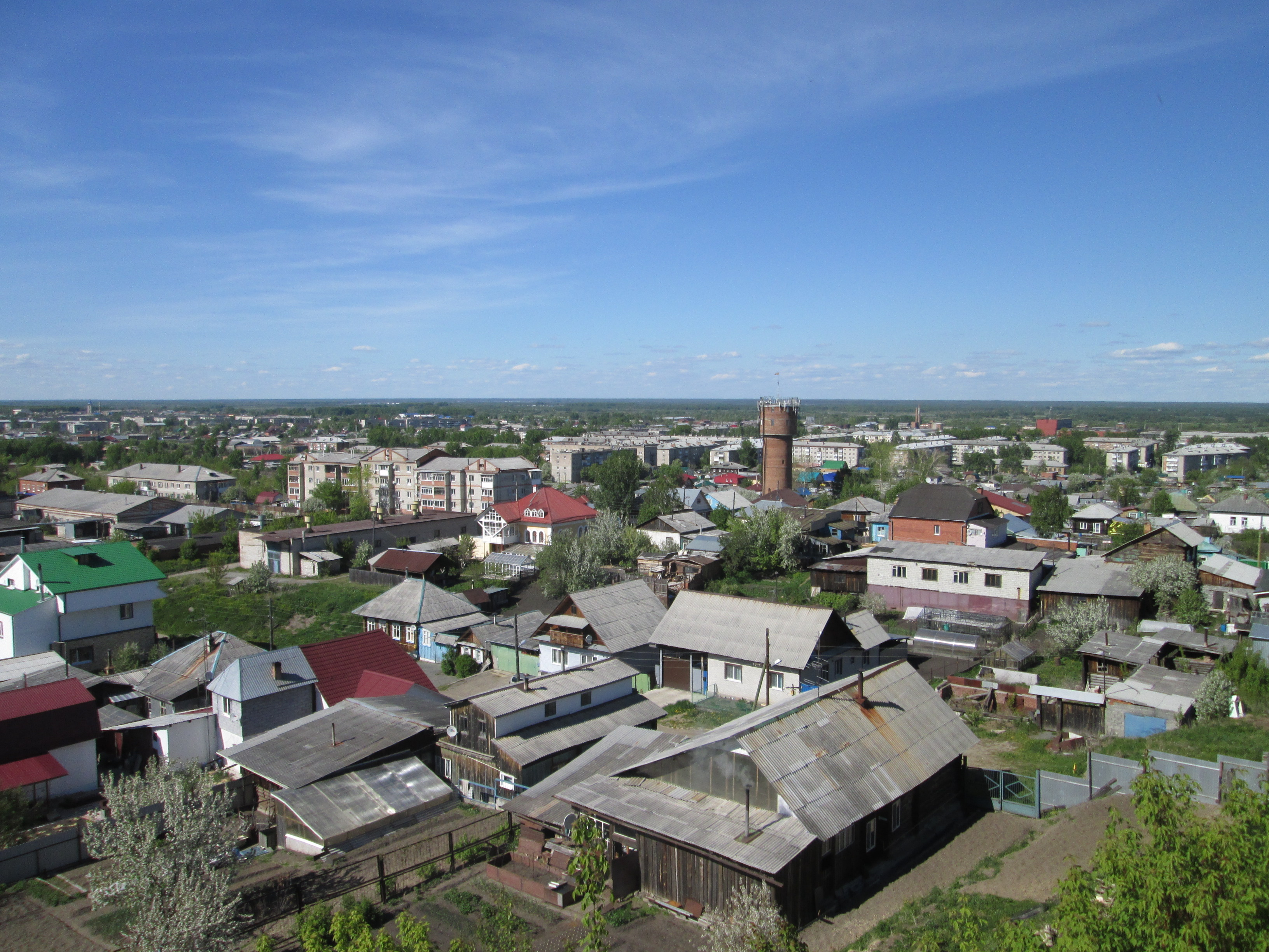 Вид с Пушкарёвой горы (север, северо-восток)